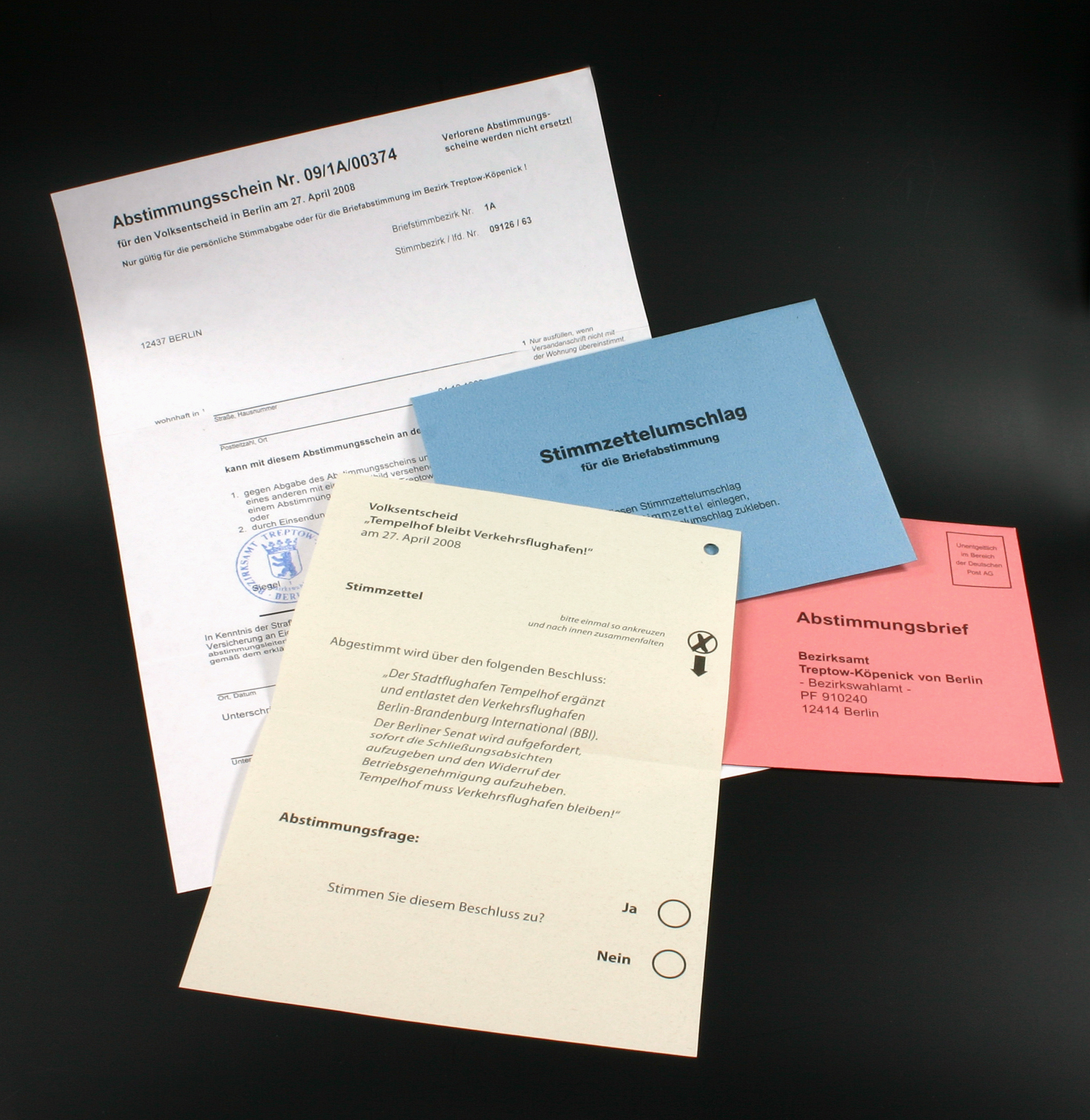 Abstimmungsschein für den Volksentscheid zum Flughafen Tempelhof, 2008